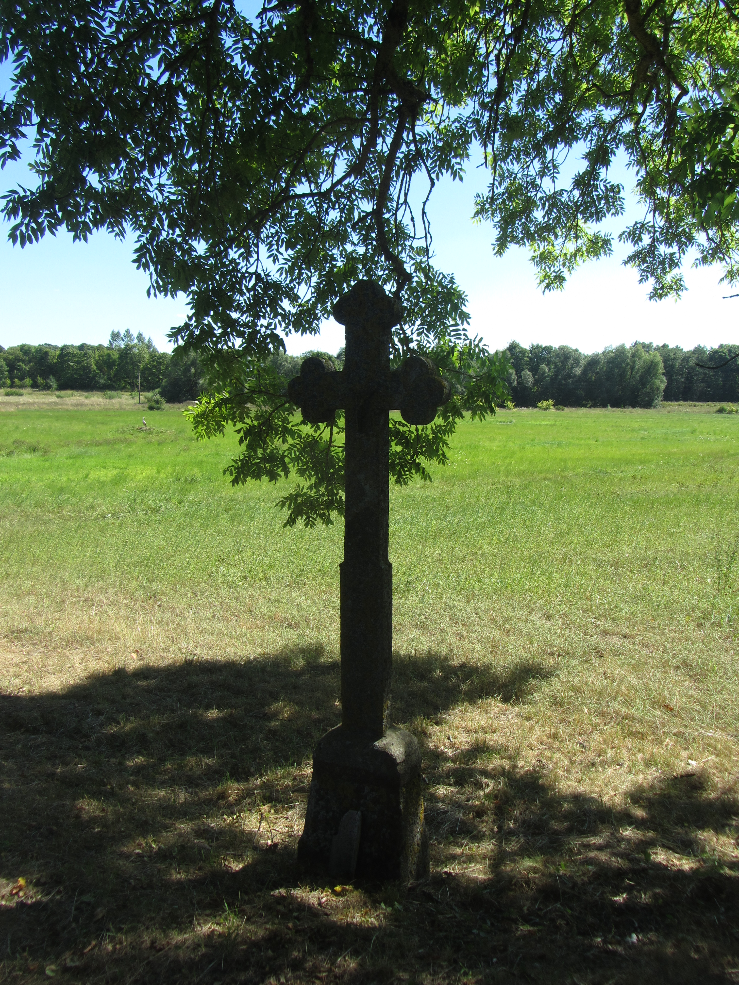 Kuosėnai 40105, Lithuania